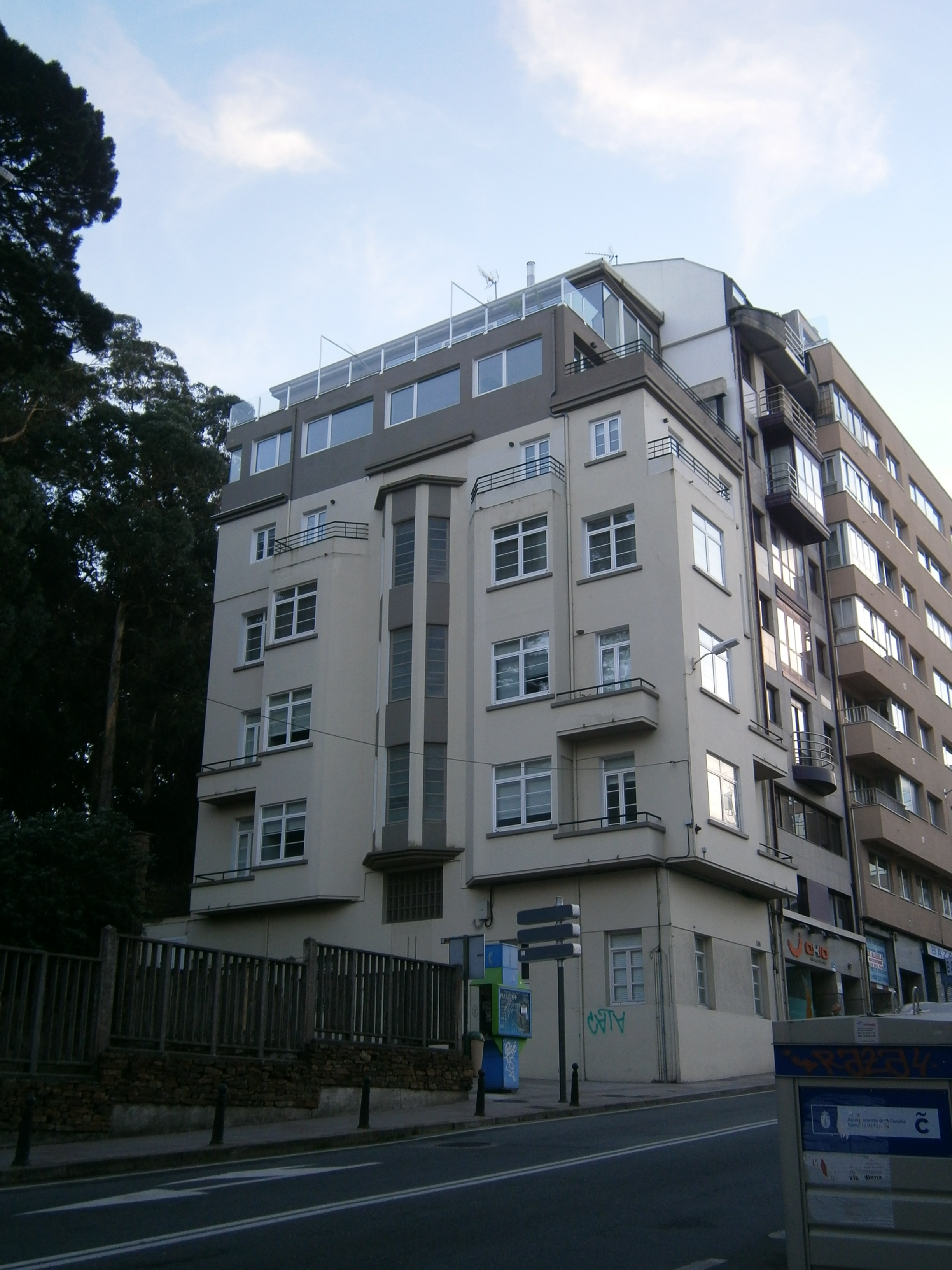 Casa Sendón (Avenida de Fisterra, A Coruña), de José Caridad Mateo